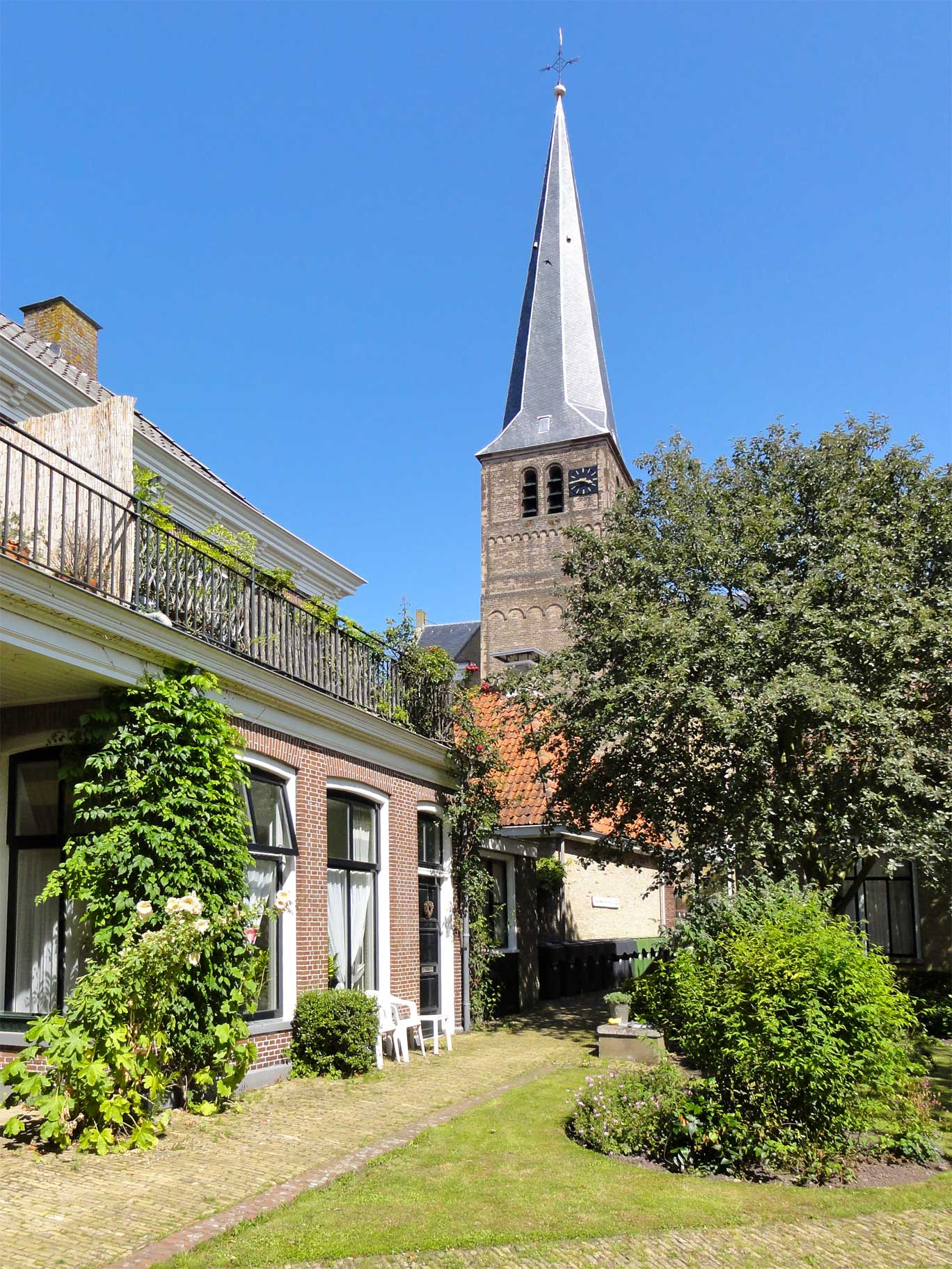 Binnenplaats van het voormalig Hervormd rusthuis of oudeliedenhuis aan het Kerkpad in Harlingen